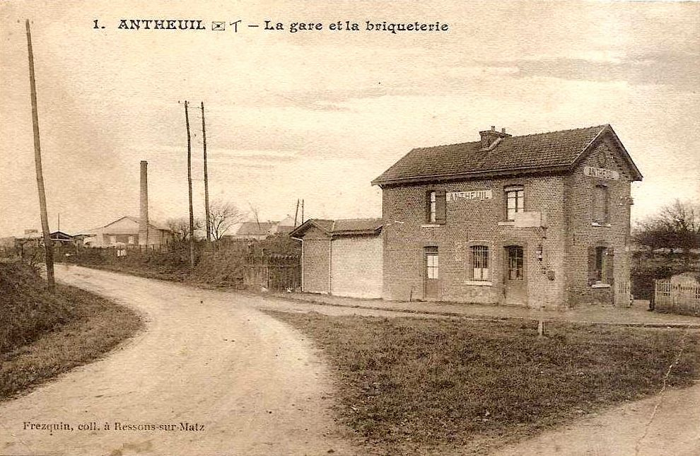 Le bâtiment-voyageurs de la halte d'Antheuil depuis la cour.